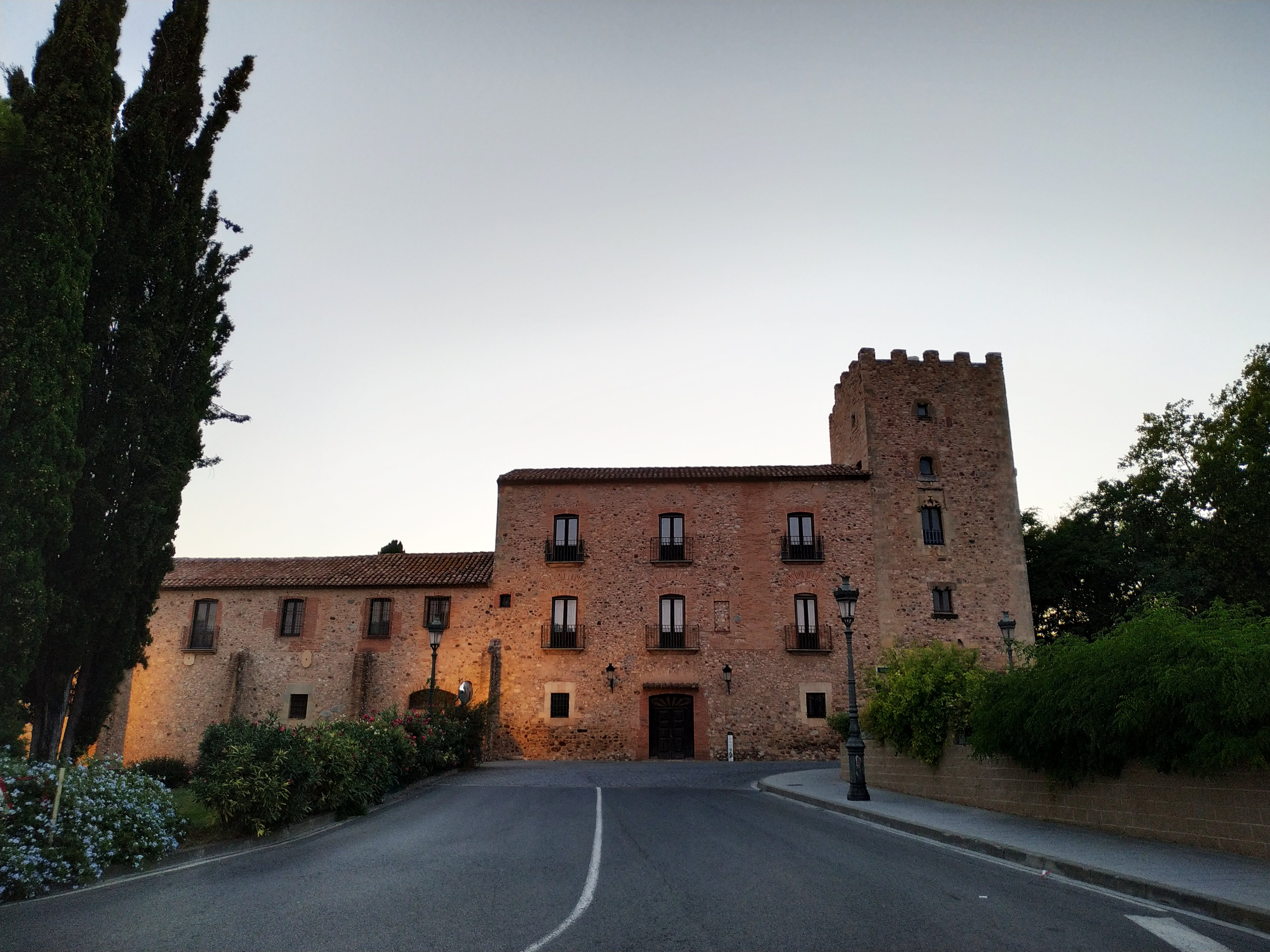 Vista general del Castillo de Vilafortuny.